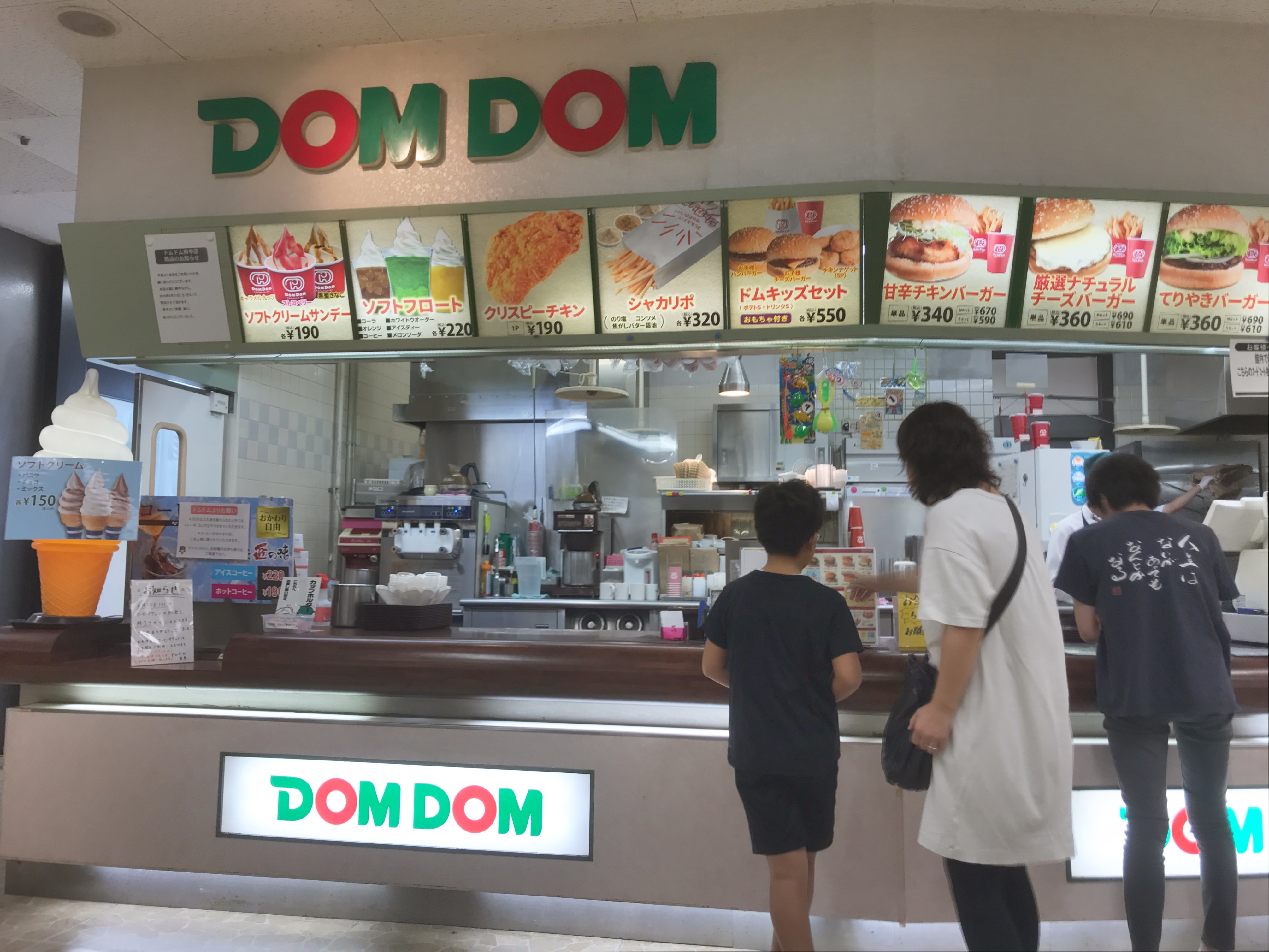 2019年8月末で閉店した、広島県最後のドムドムバーガーショップ；天満屋ハピータウン府中店にて撮影。